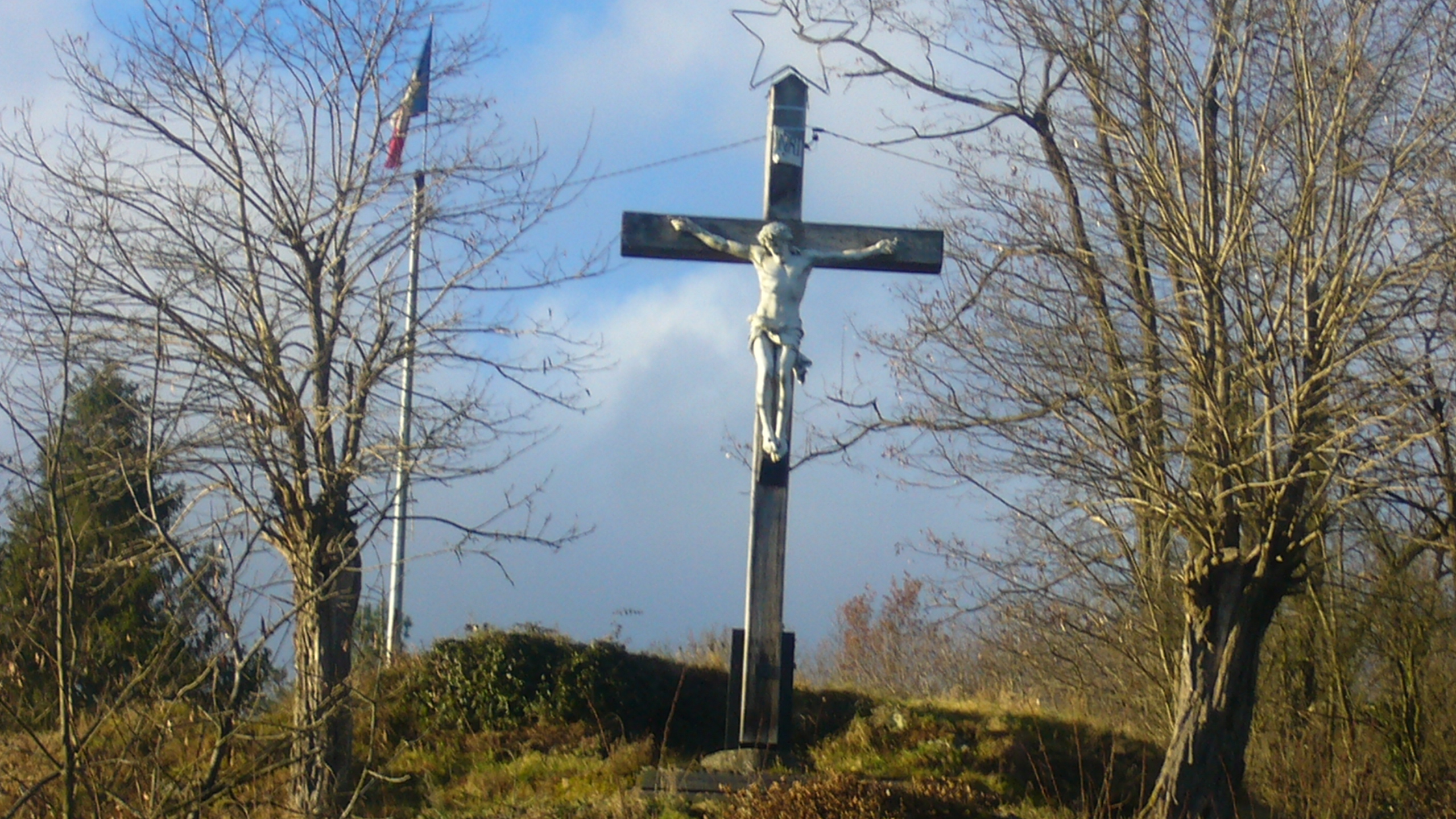 Lièpvre 030.JPG